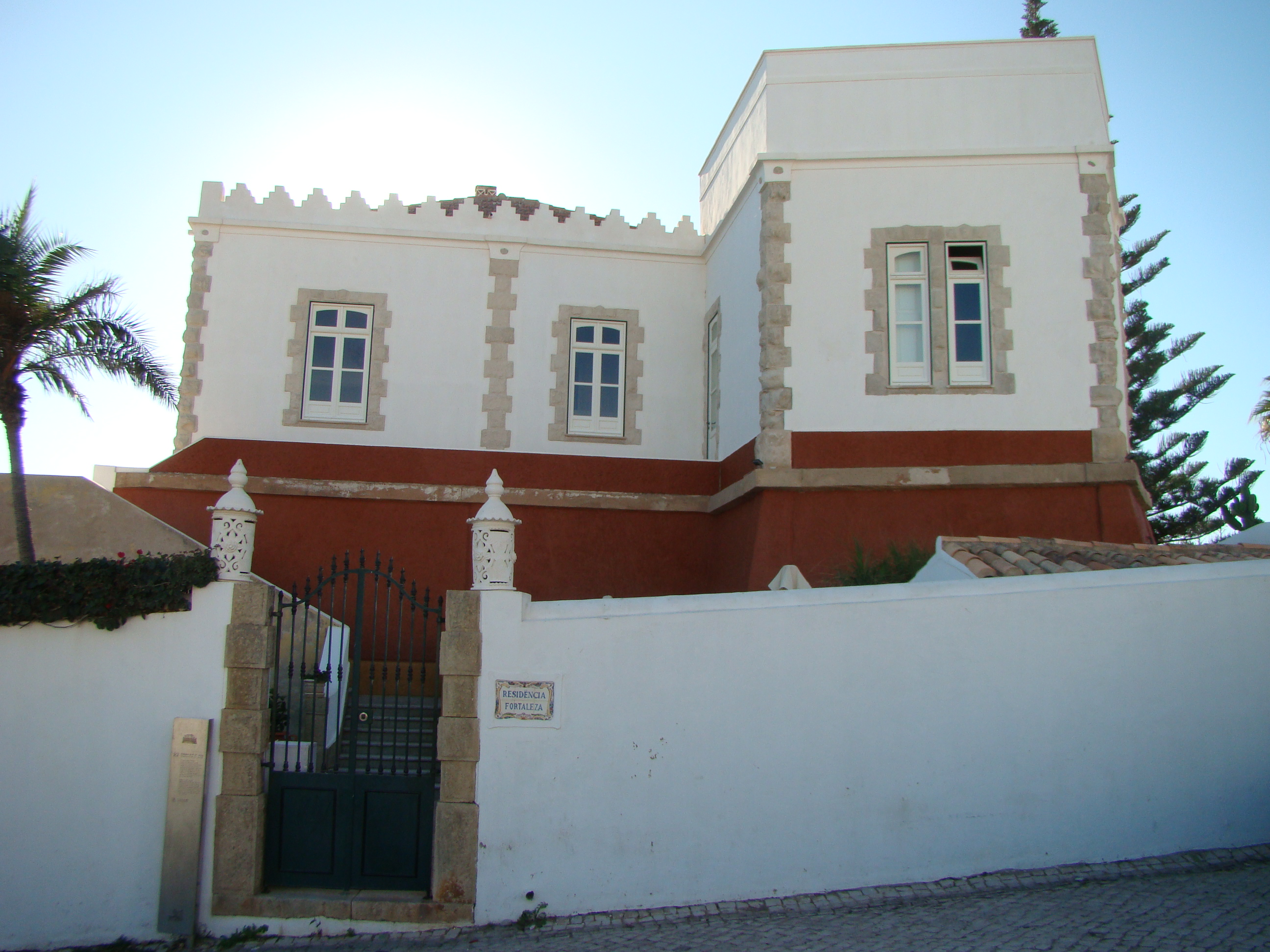 Castelo da Senhora da Luz 3